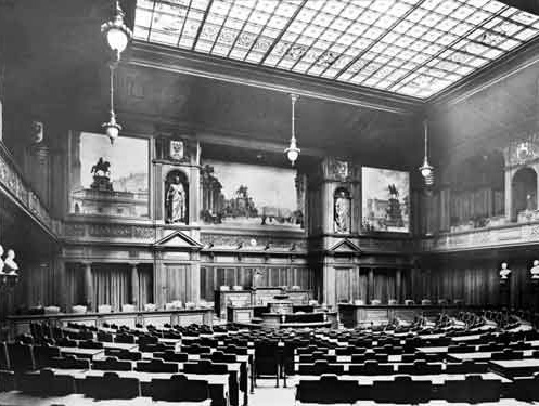 Fotografie vom Sitzungssaal des Preußischen Herrenhauses in Berlin